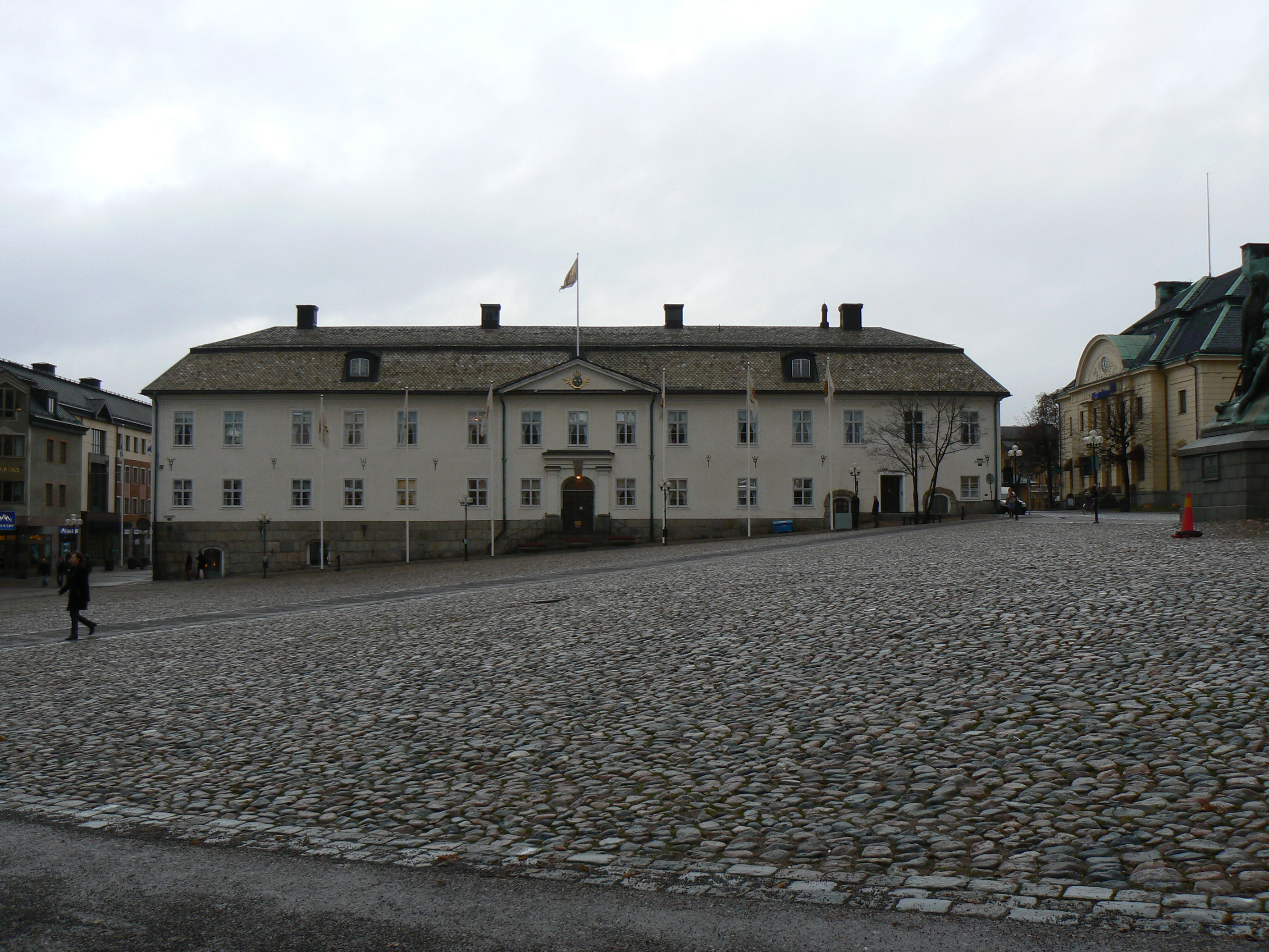 Stora torget (Big Square) in Falun, Sweden. Photo by Skvattram 2006-11-25.